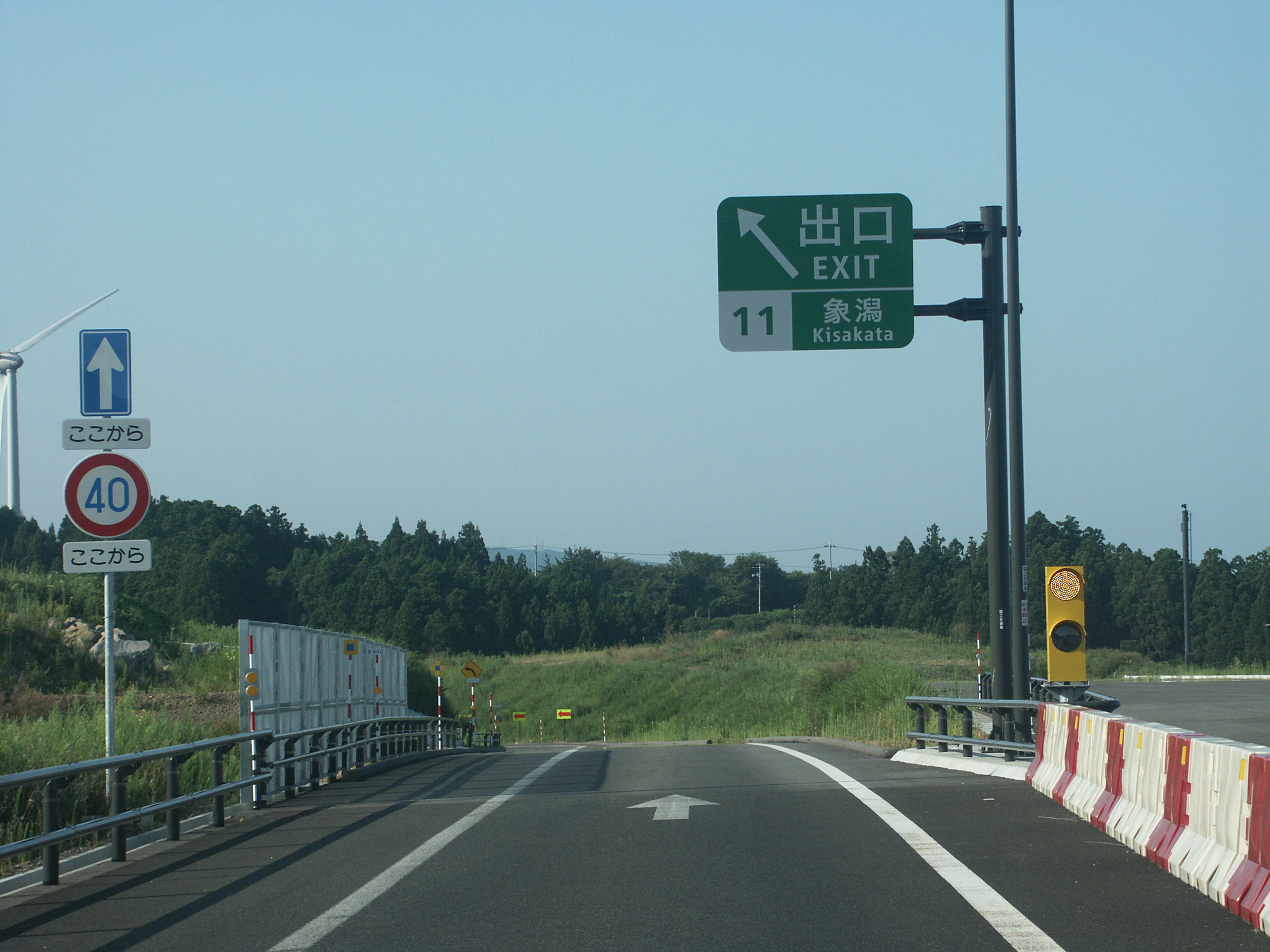 日本海沿岸東北自動車道（国道7号象潟仁賀保道路）象潟IC出口（秋田市方面側）